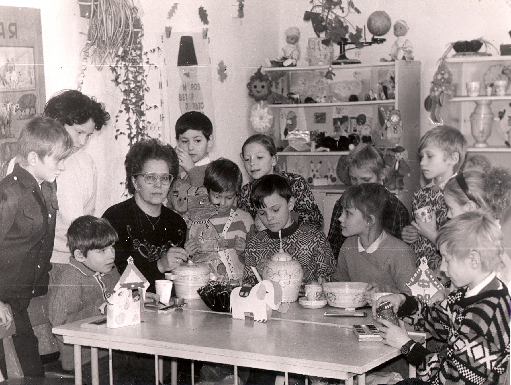 Бутаковская школа в начале 1990-х.